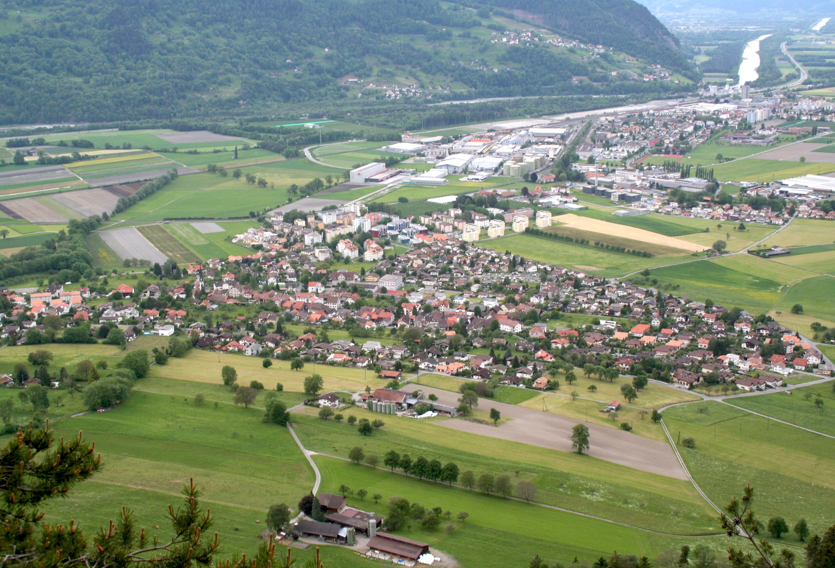 Igis von Osten